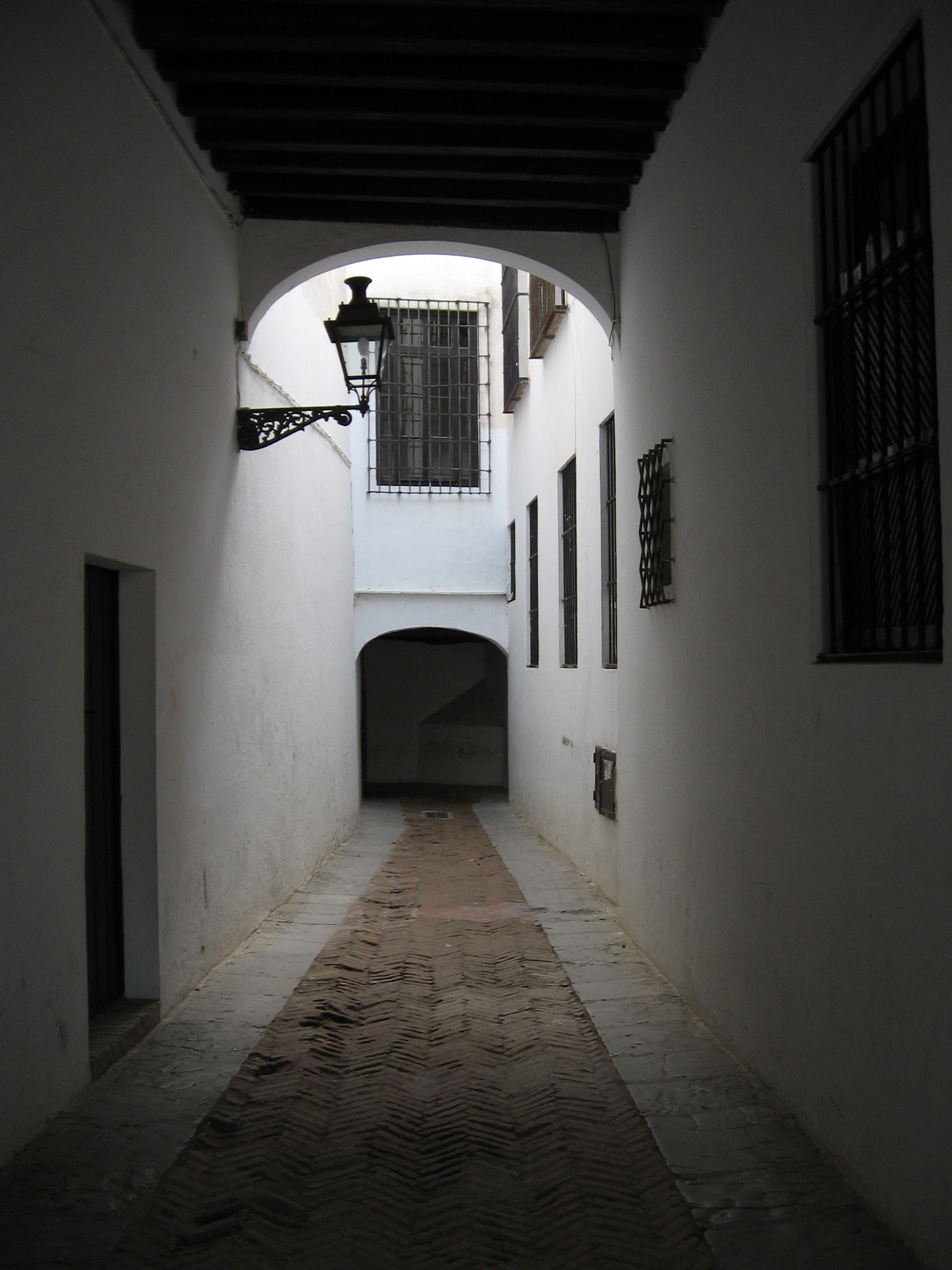 Pasaje entre el Patio de Banderas del Alcázar y la calle Judería, en Sevilla (Andalucía, España)